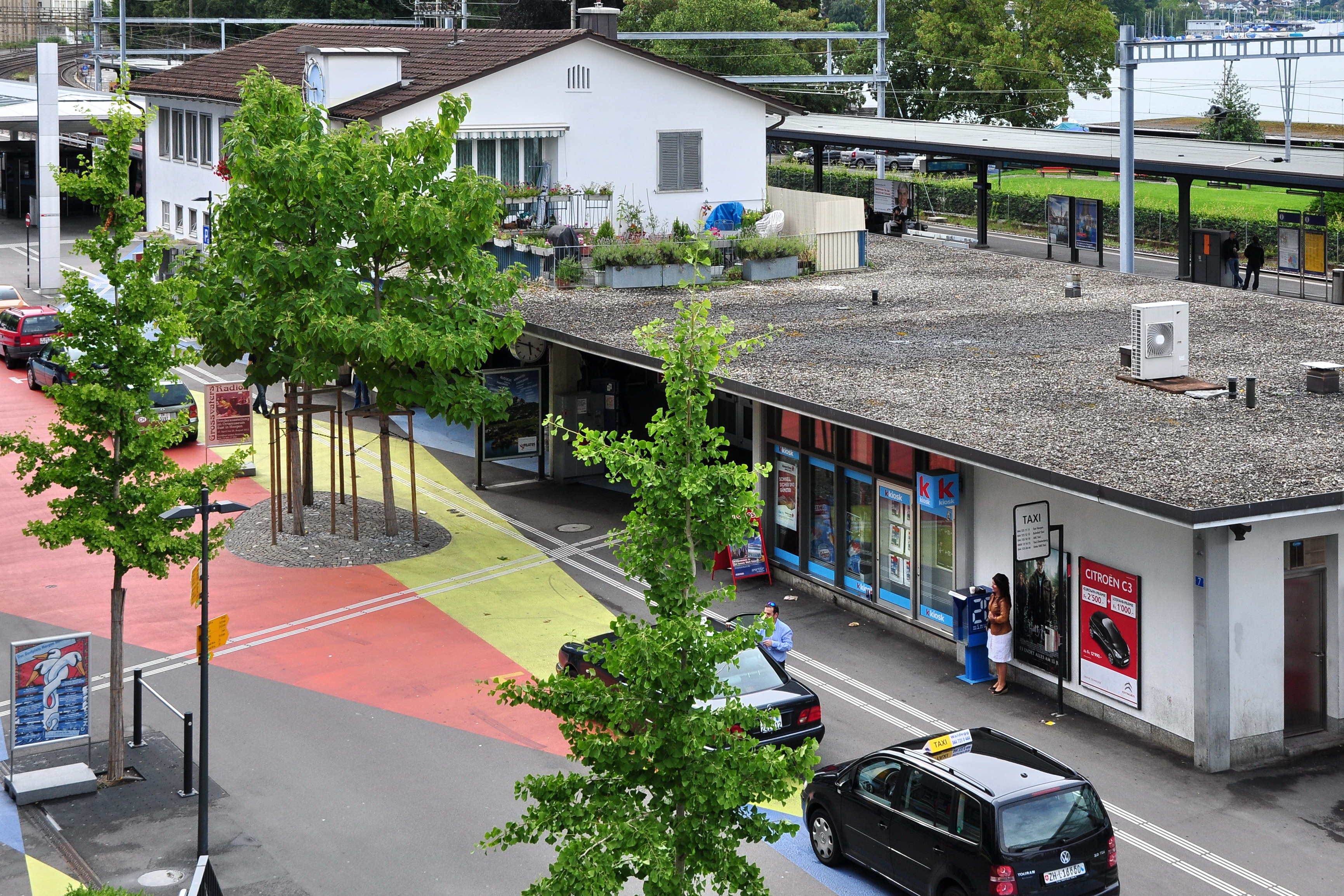 Bahnhof in Horgen (Switzerland)